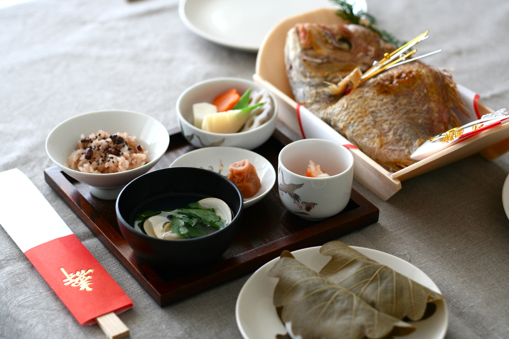 中文（香港）: 日本端午節食品